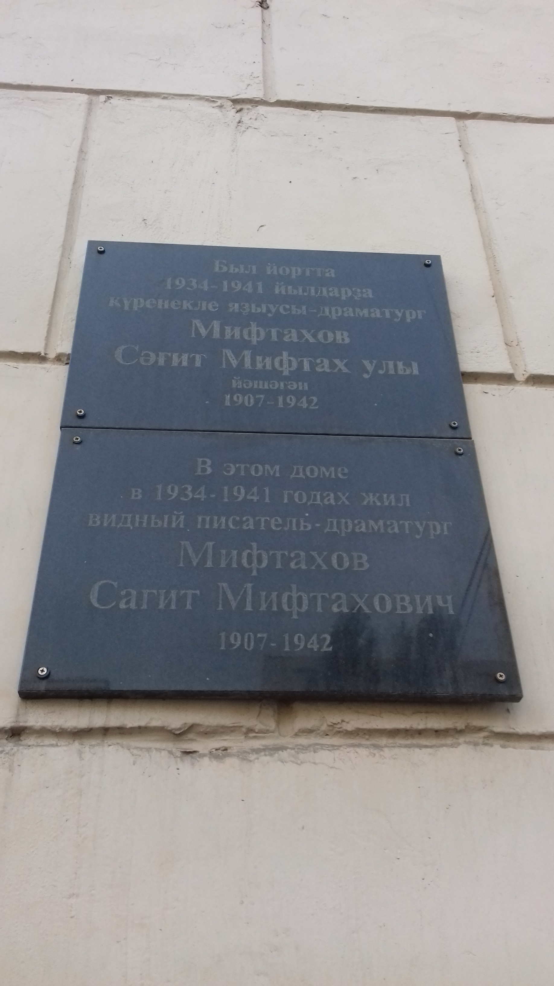 Мемориальная доска (Мифтахов С.М.) на ул.К.Маркса 17/19 (Уфа)